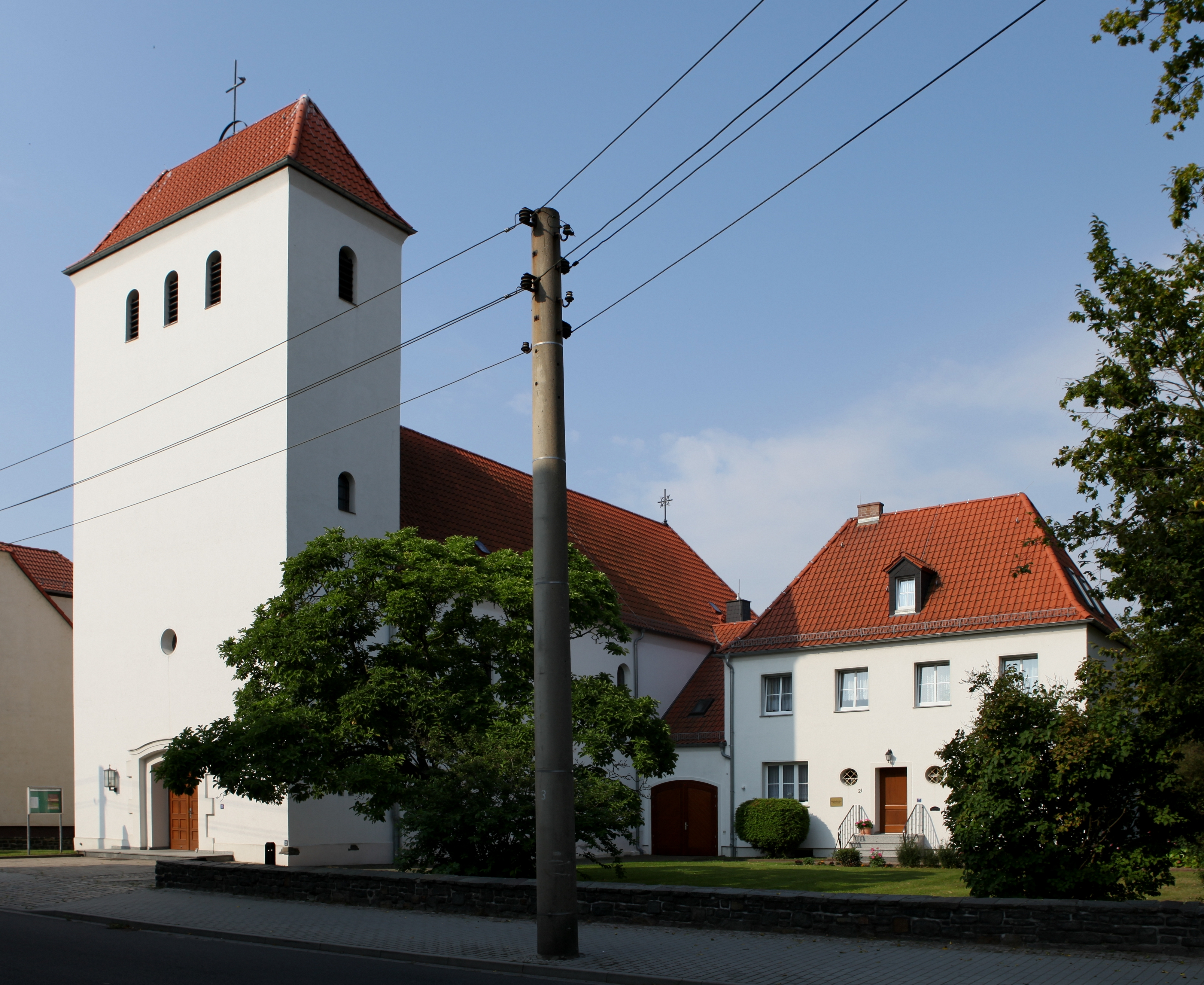 Kulturdenkmal Katholische Pfarrkirche St. Franz Xaver in Eilenburg; Objektnummer: 08973264